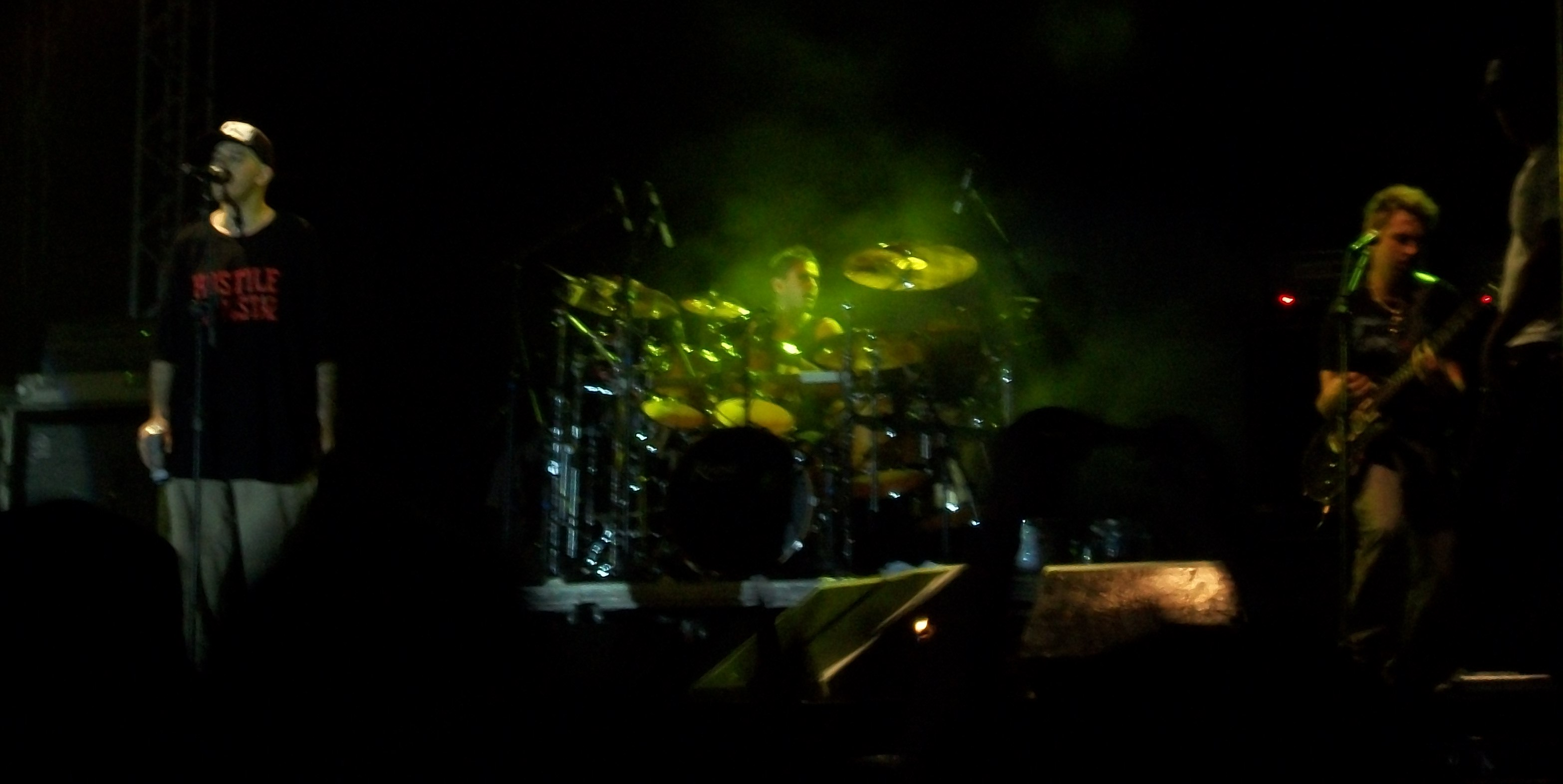 Charlie Brown Jr. no 7° Megamotofest Araçatuba.